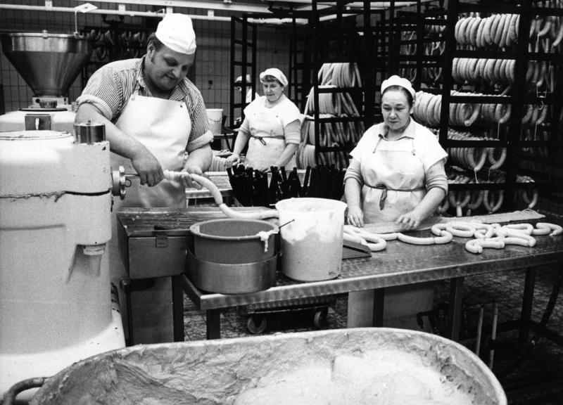 25. Januar 1973 VW-Werk, Wolfsburg Schlachter beim Spritzen von Bock- und Currywurst Im Hintergrund für den Räuchervorgang aufgehängte Wurst